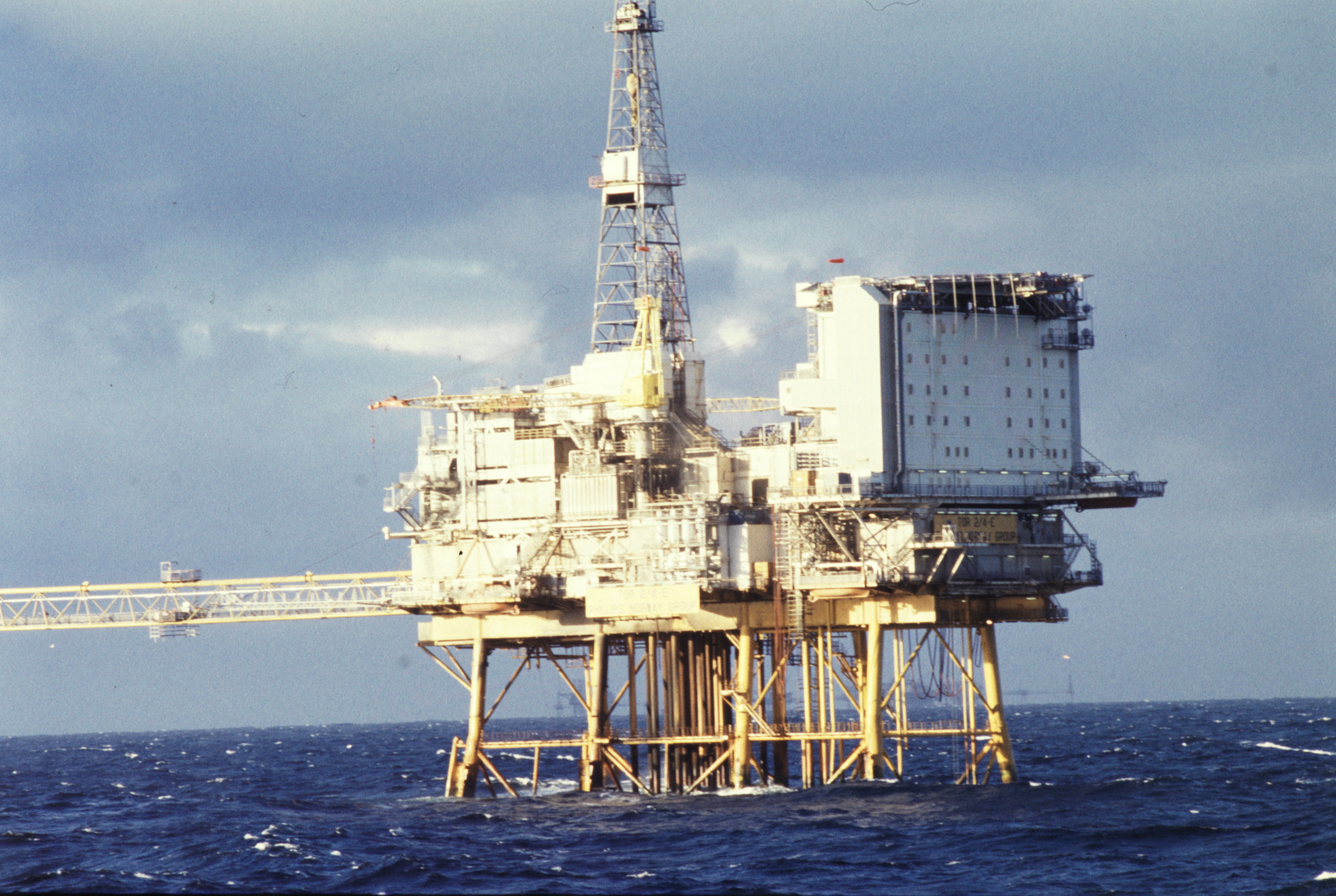 Foto av oljeplatformen Tor...Group no. 53-50-01-00 Picture no. 329936..Tor oljeplatform.Ekofisk feltet - operatør Phillips.blokk 2/4 E Nordsjøen